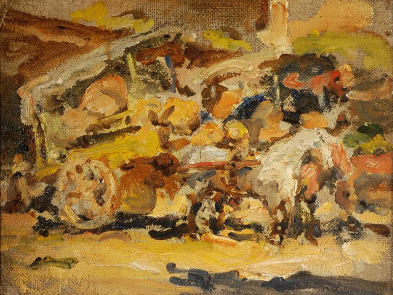 "Carretelas en la vega" nos muestra al artista en su madurez, tanto en la forma, en el despliegue suelto y libre del pincel como en la temática donde exalta lo cotidiano en una visión apasionada, que perduró toda su obra.